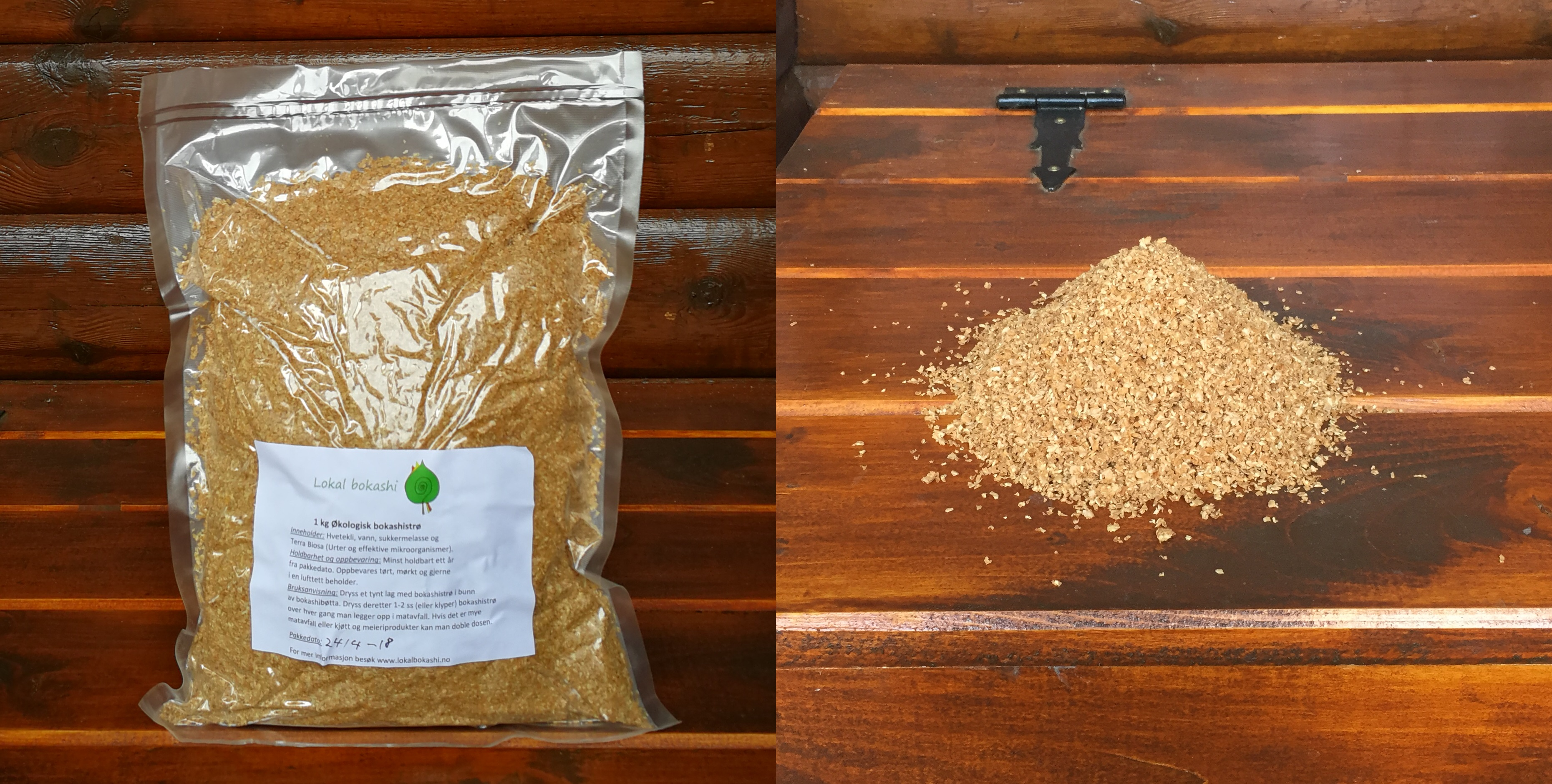 Bokashistrø basert på hvetekli